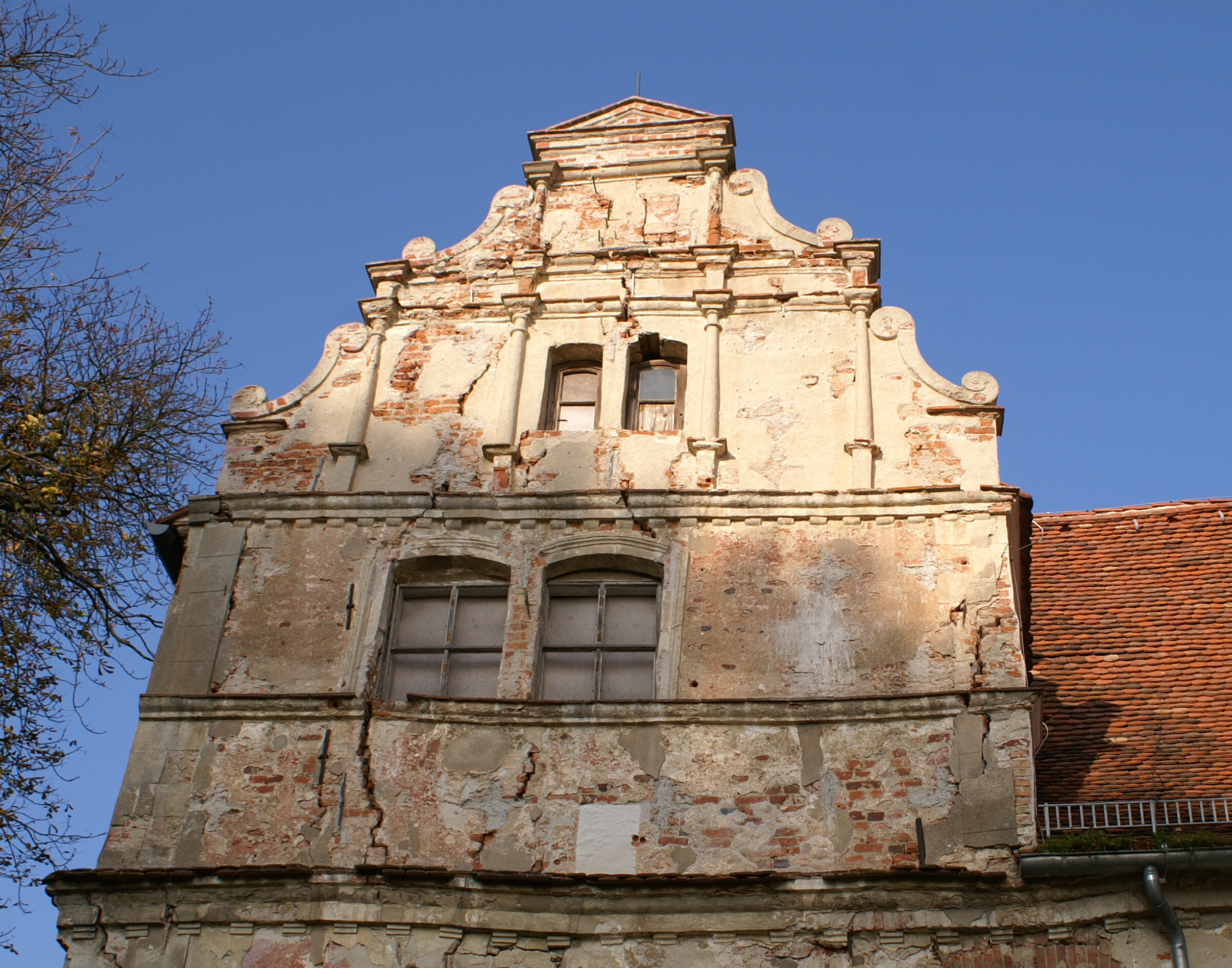 Wasserschloss Quilow, Landkreis Ostvorpommern, Giebel des westlichen Zwerchhauses